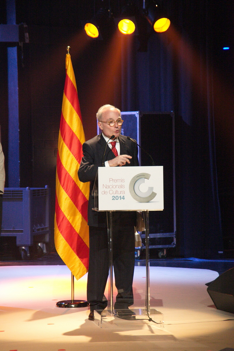 Lliurament dels Premis Nacionals de Cultura de Catalunya 2014. Santa Coloma de Gramenet, 2 de juny de 2014